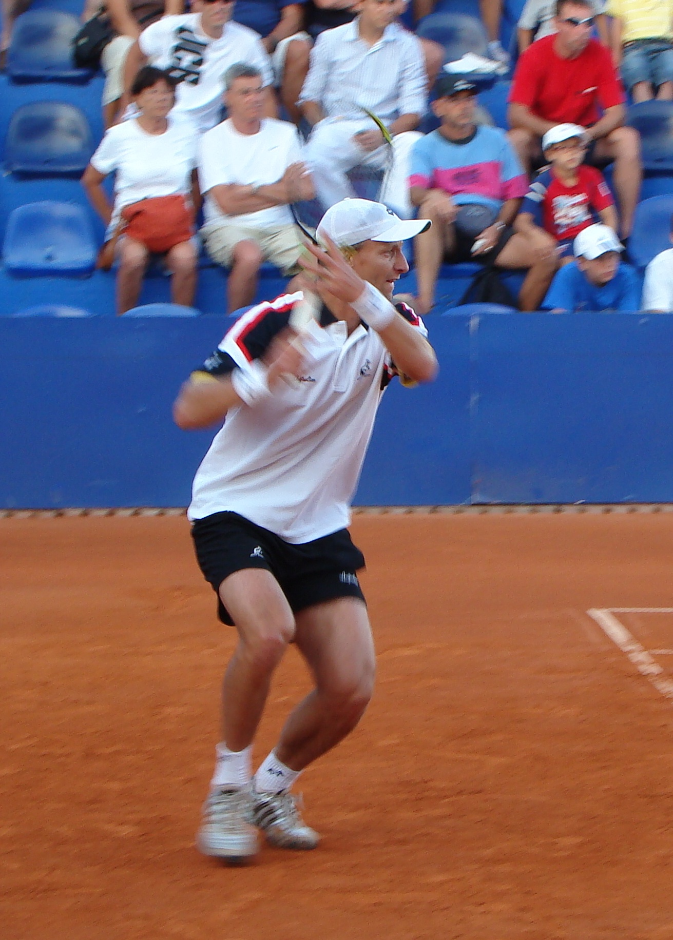 Jiří Vaněk in Umag, Croatia